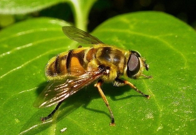 Myatropa florea, Gradignan, Gironde, France